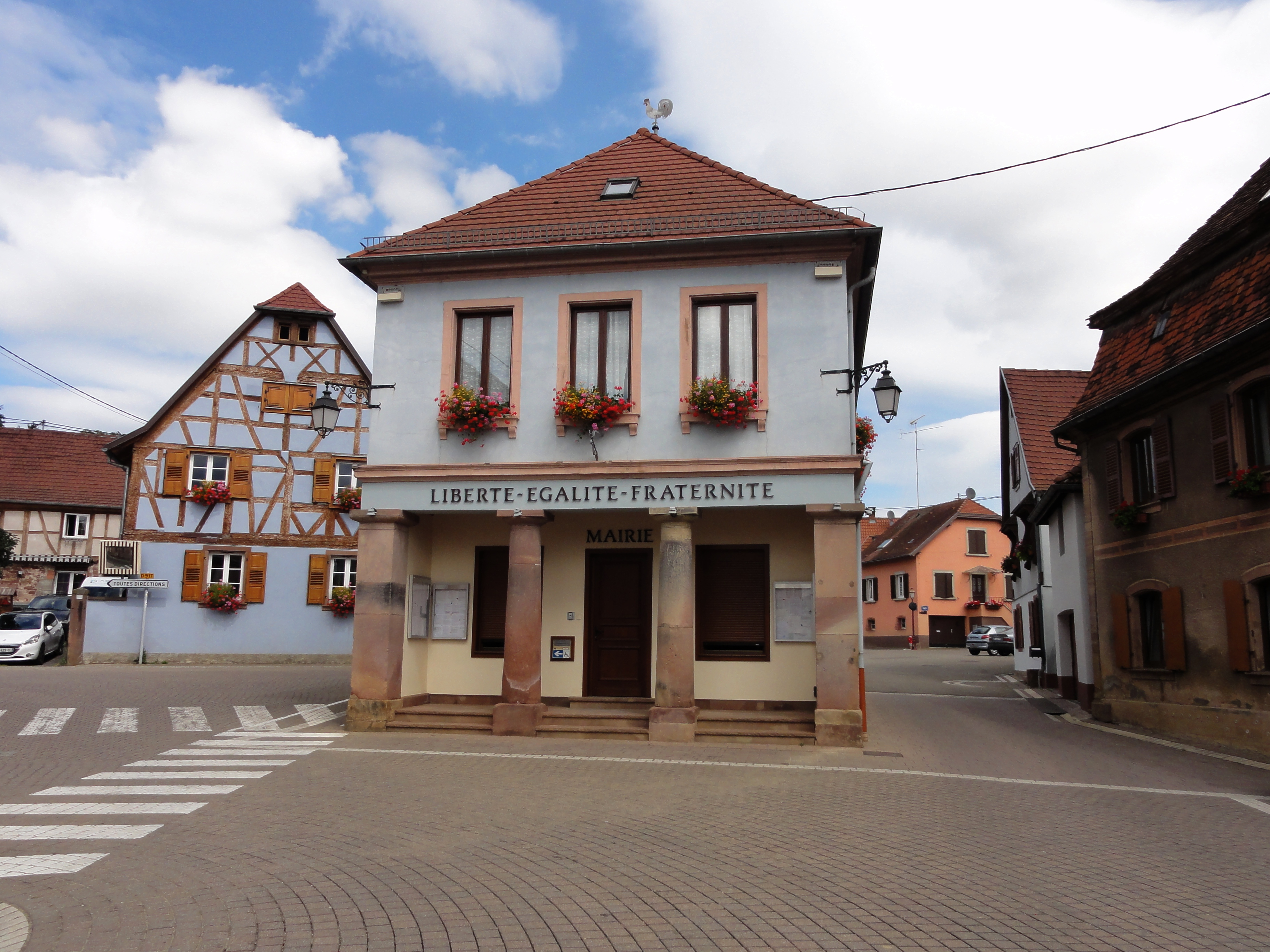 Alsace, Bas-Rhin, Romanswiller, Mairie (XIXe), place de la Mairie.